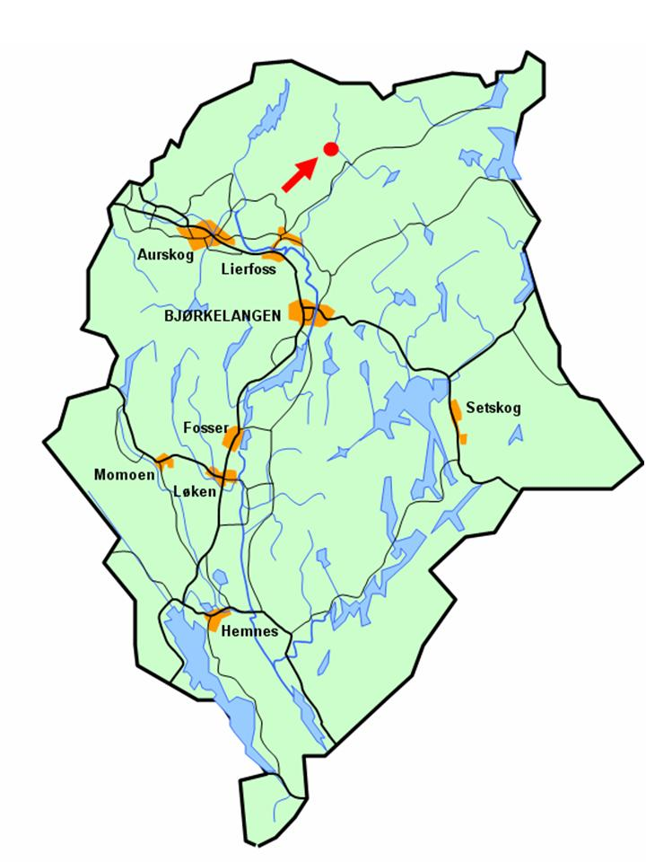 Stilisert kart som viser Elgtjern sin lokalisering i Aurskog-Høland kommune.